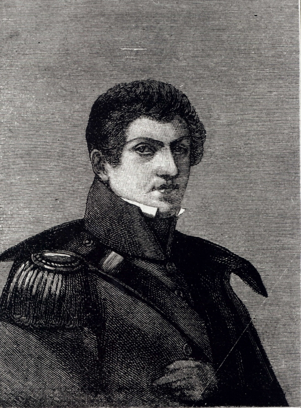 Autoportret w mundurze oficerskim